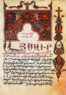 Певческий сборник. Мастер Саргис Пицак. 1322 г. Киликия (Ierus. Arm. 1644. P. 245)